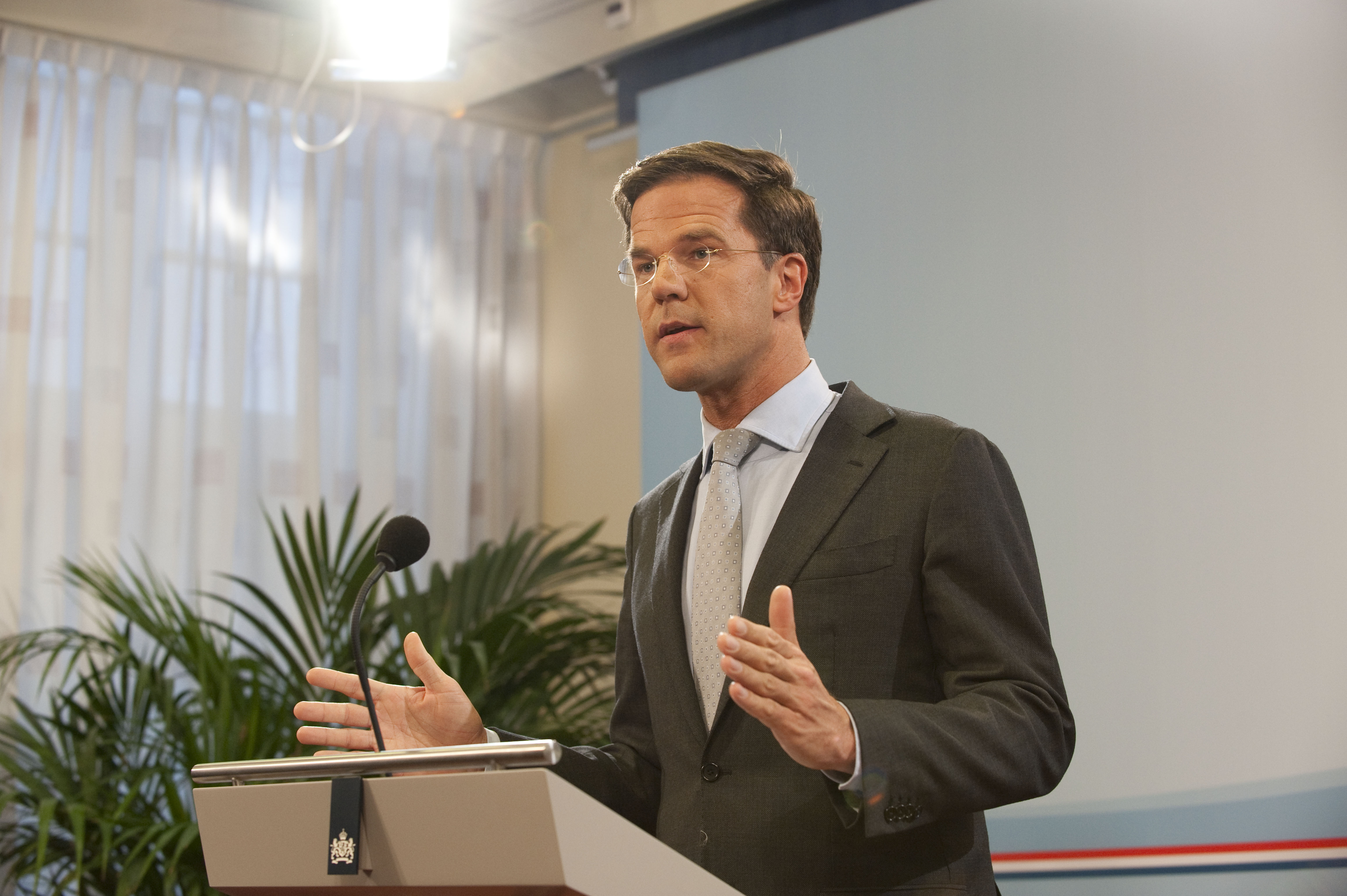 14/10/10: Mark Rutte houdt zijn eerste persconferentie als minister-president